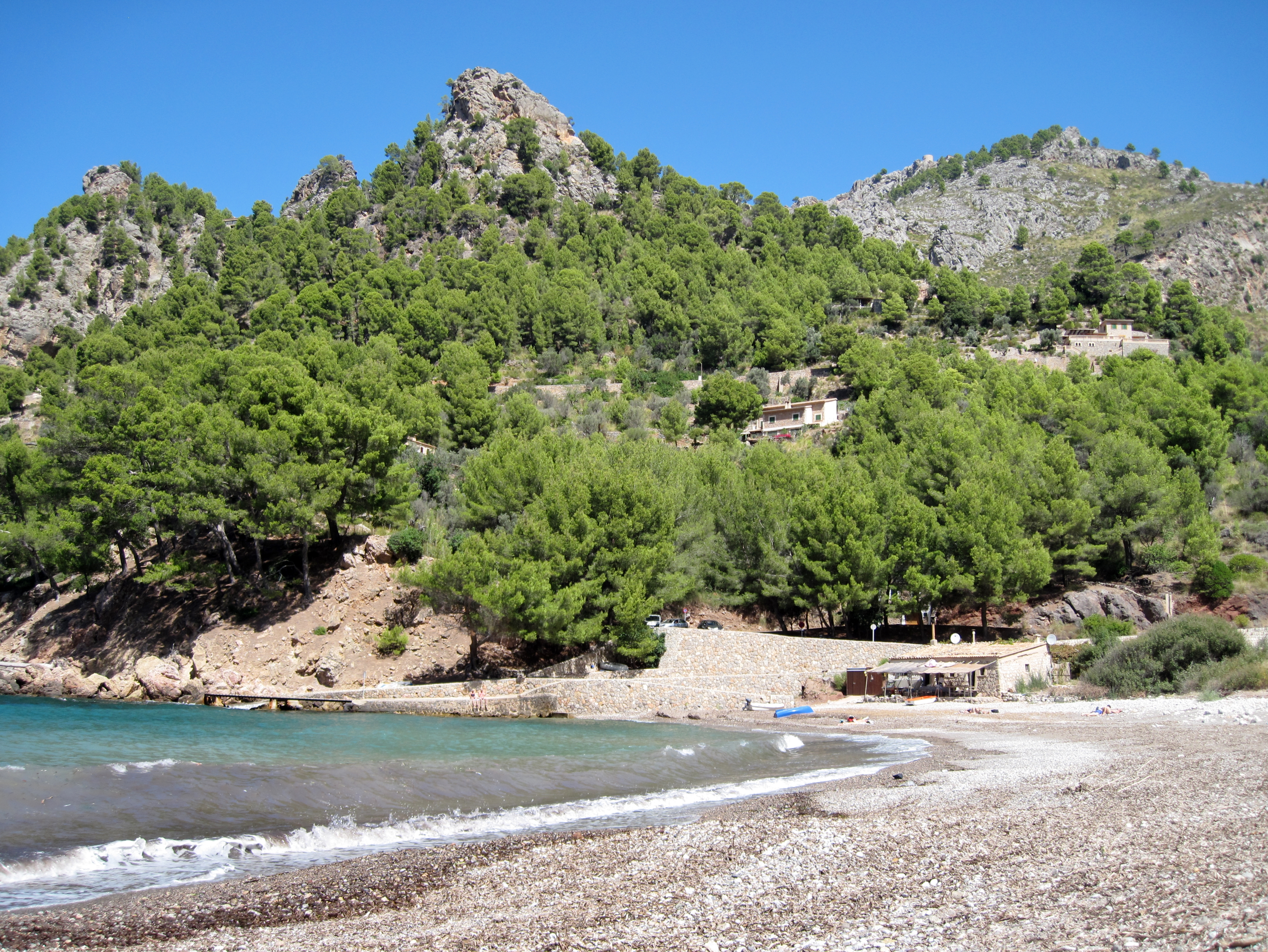 Strand an der Cala Tuent in der Gemeinde Escorca, Mallorca, Spanien